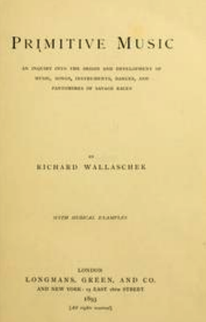 Portada de la primera edició del llibre Primitive Music (1893), de Richard Wallaschek.